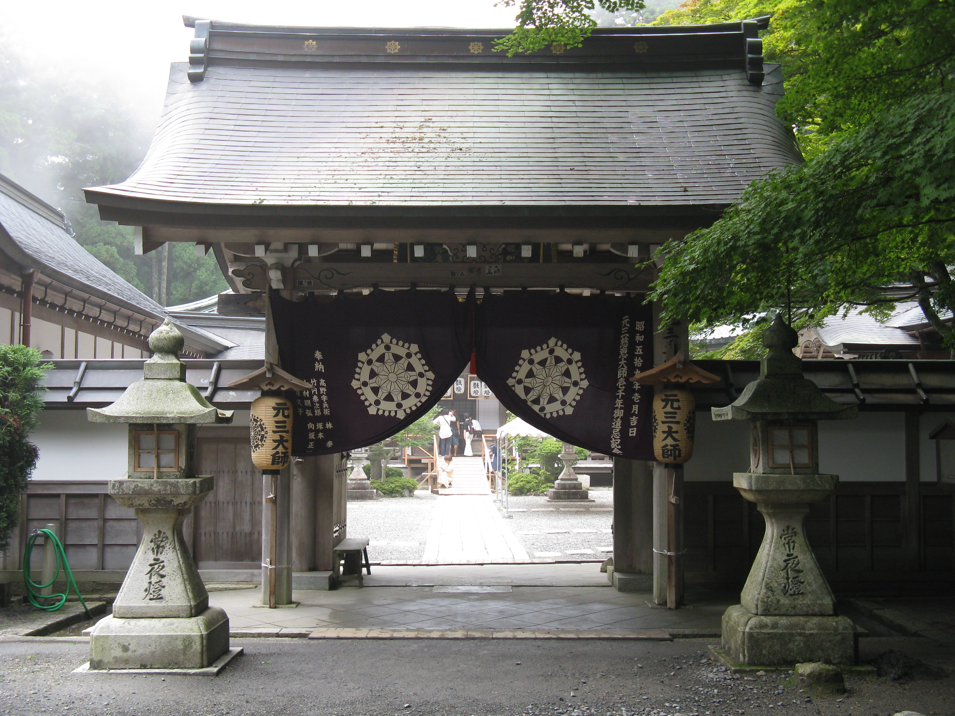 延暦寺 四季講堂